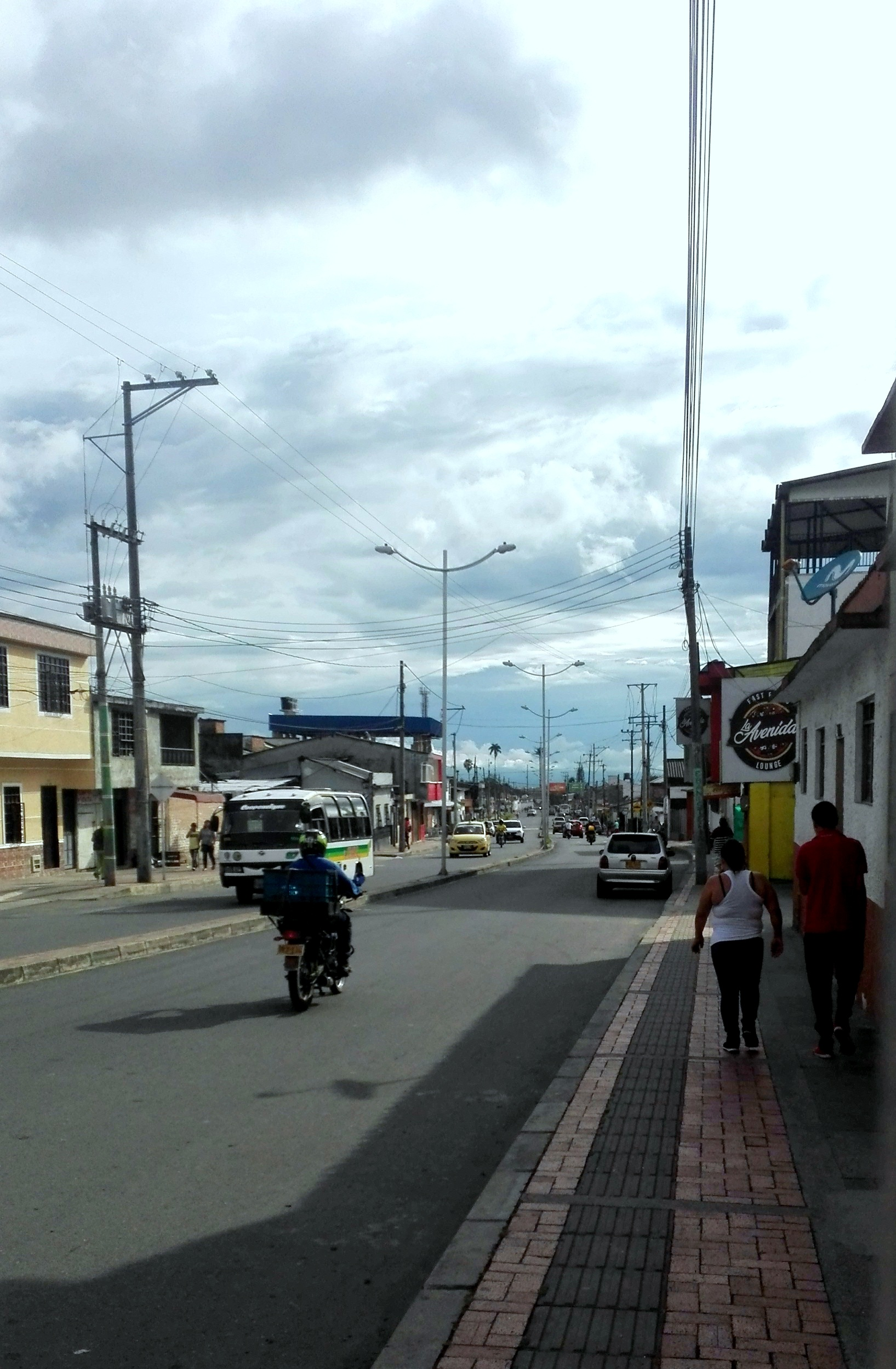 Avenida Colón de Calarcá, Quindío sobre la Estación de Servicio Las Palmas.